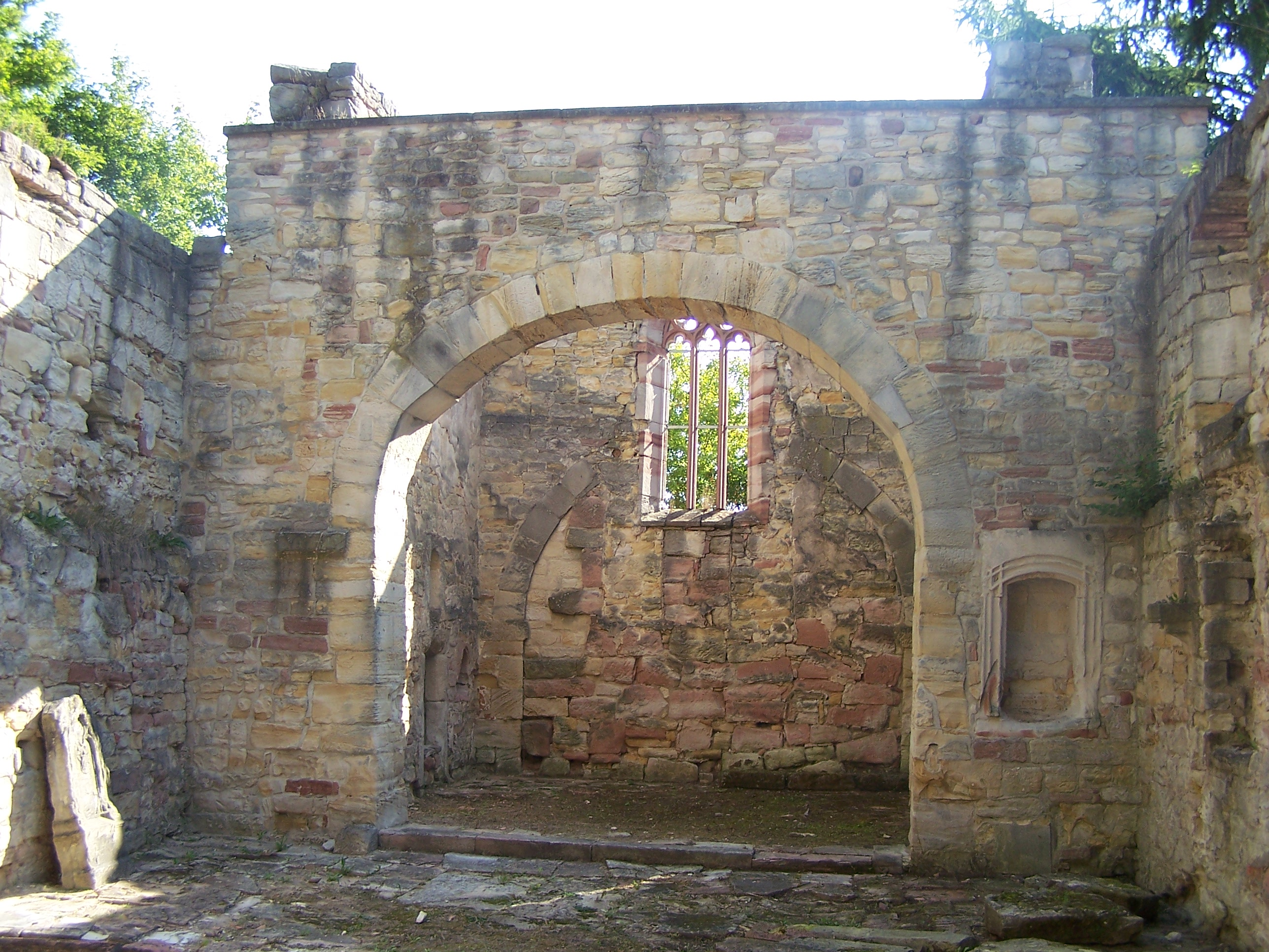 Ansichten und Details zur gotischen Kirchenruine Husenkirche in Bad Salzungen, Leimbacher Straße im Sommer 2017.